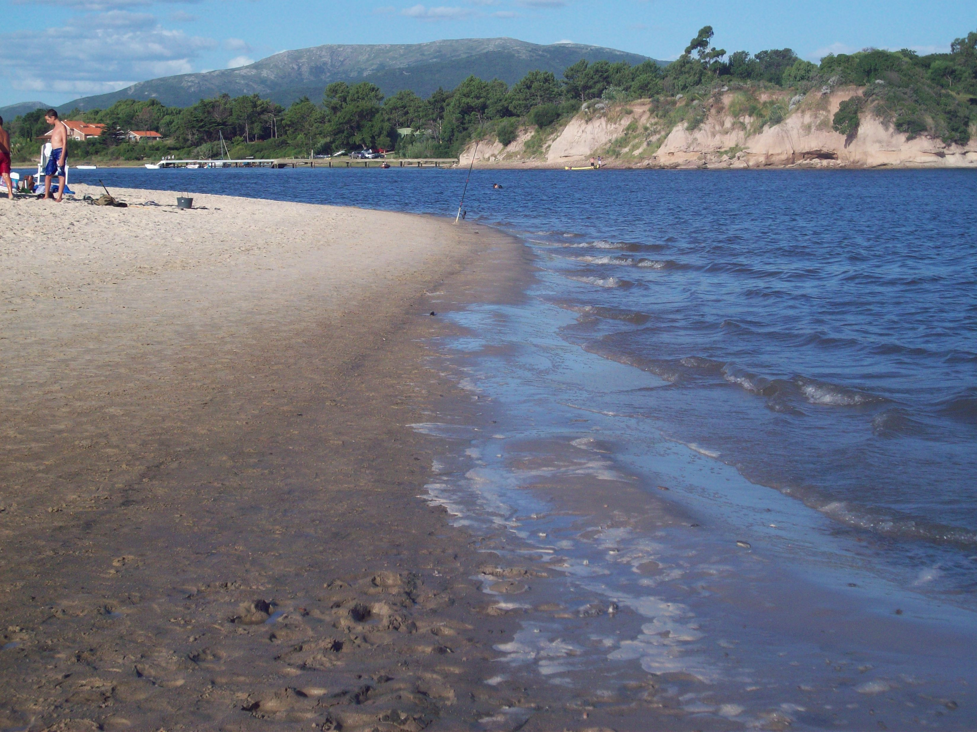 El Arroyo Solis Grande que divide los Departamentos de Canelones y Maldonado, desemboca en el Rio de la Plata en el Balneario Jaureguiberry